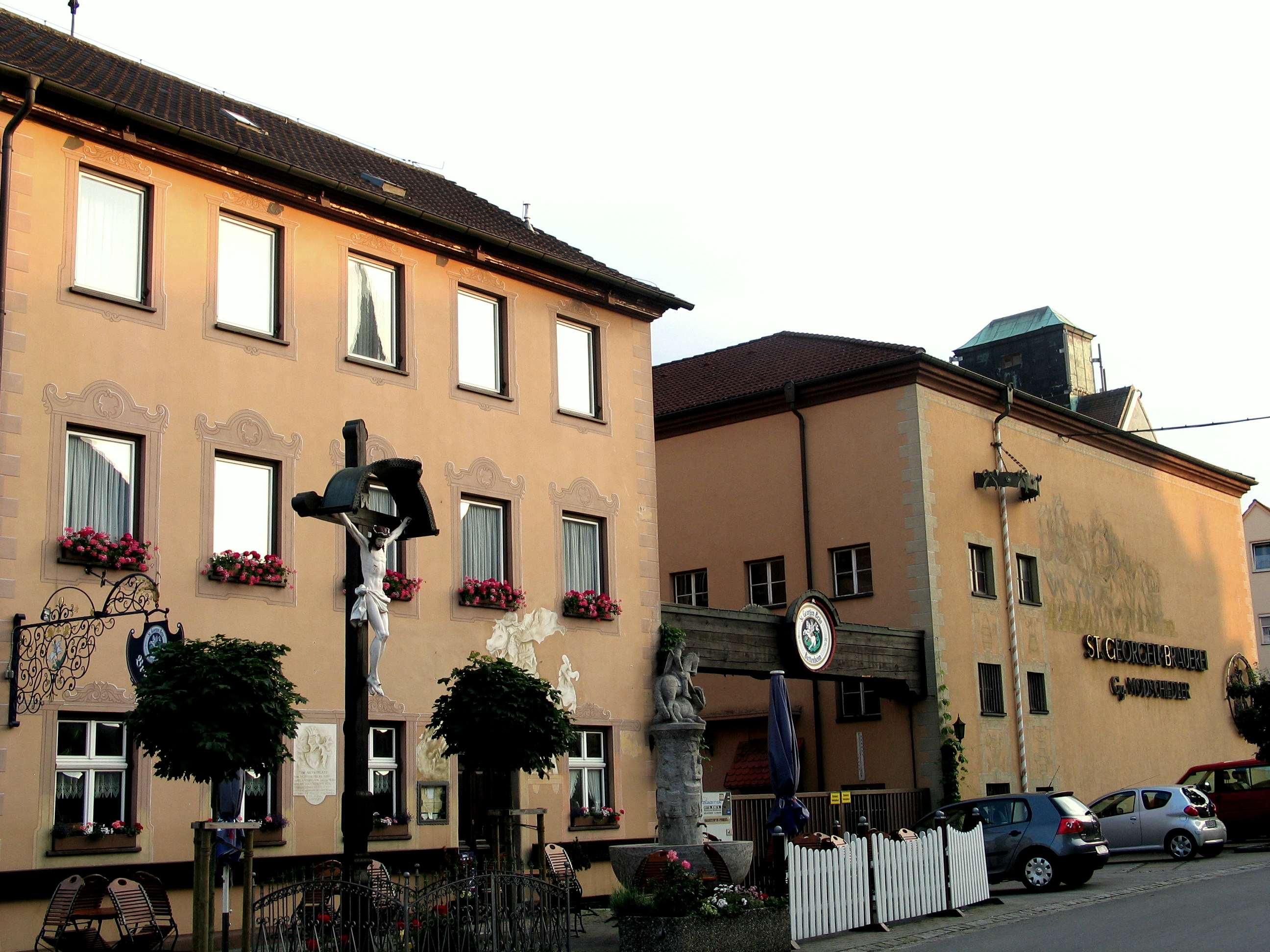 Buttenheim - Brauerei St. Georgen (Straßenansicht)